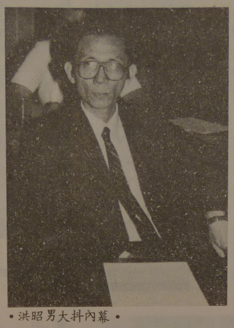 洪昭男質詢「江南案」的消息遭主流媒體封鎖，僅鄭南榕《自由時代雜誌》仍勇敢報導